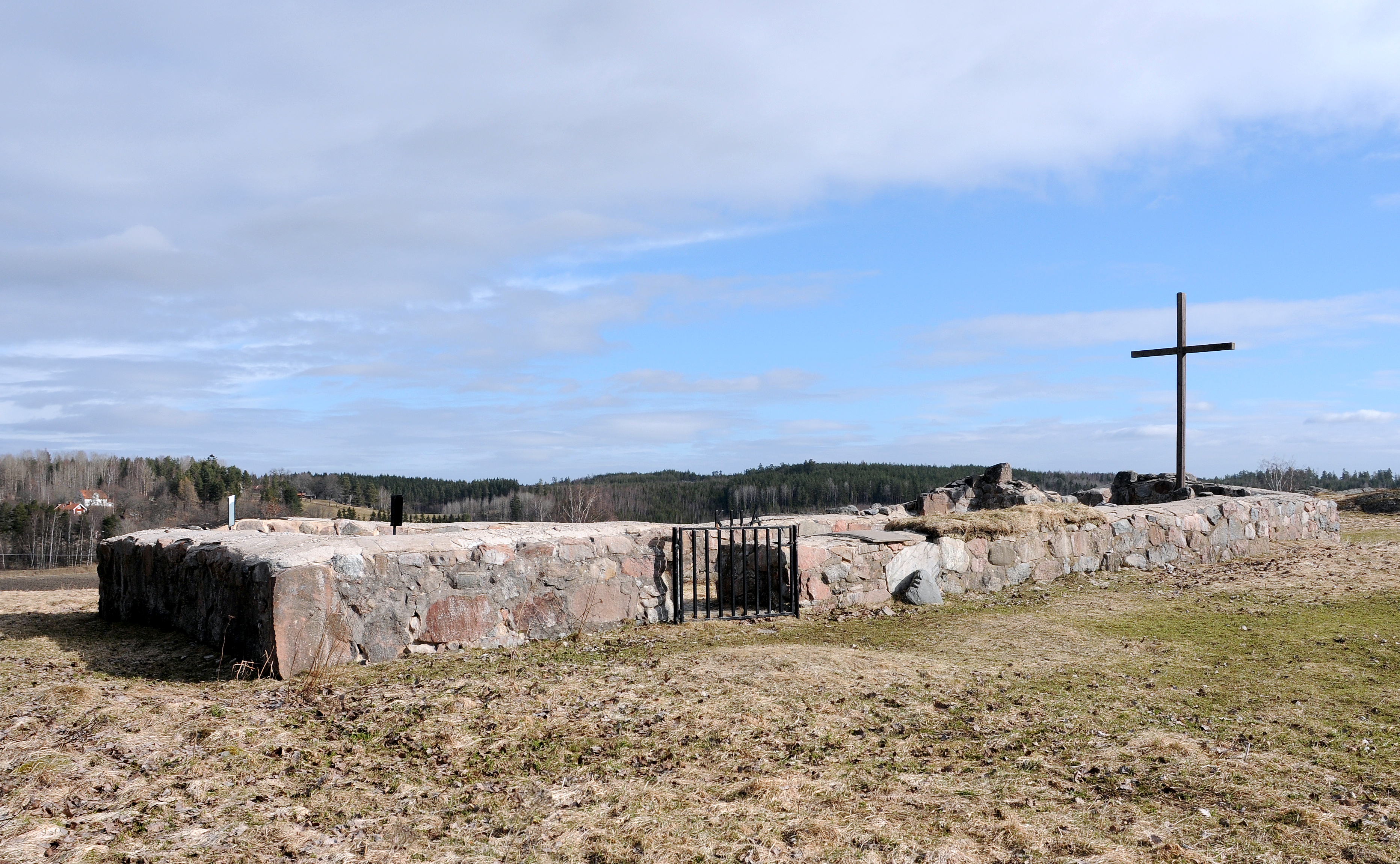 Kila medeltida stenkyrka i Nyköpings kommun. Klockbacken (Kila 13:2)